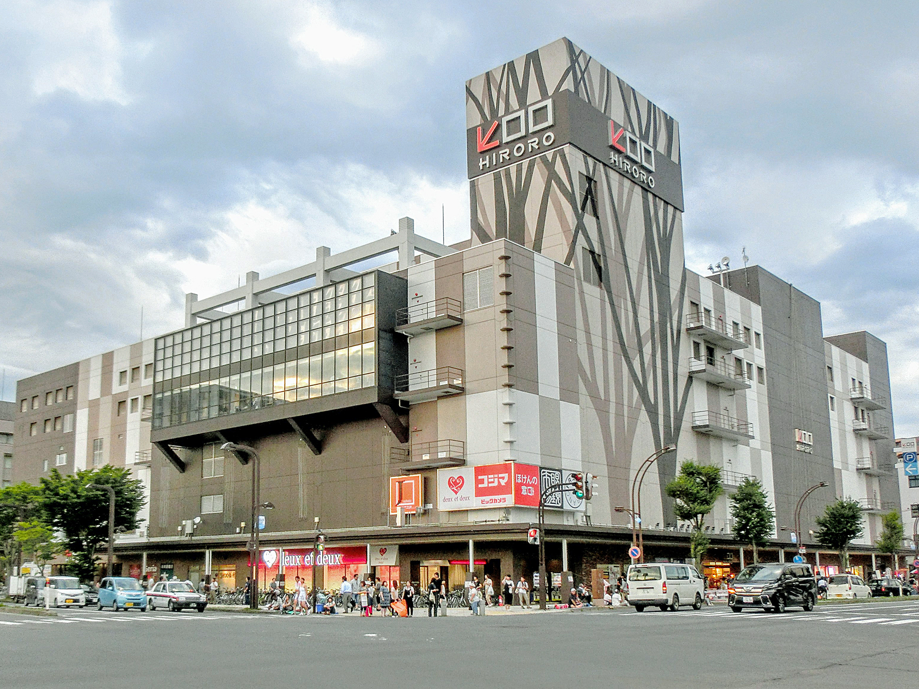 青森県弘前市駅前にある複合商業施設「ヒロロ」の外観。2016年8月撮影。